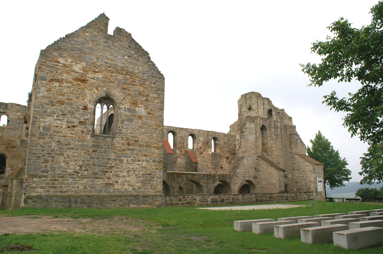 Ruine der Stiftskirche Walbeck (Ohrekreis)